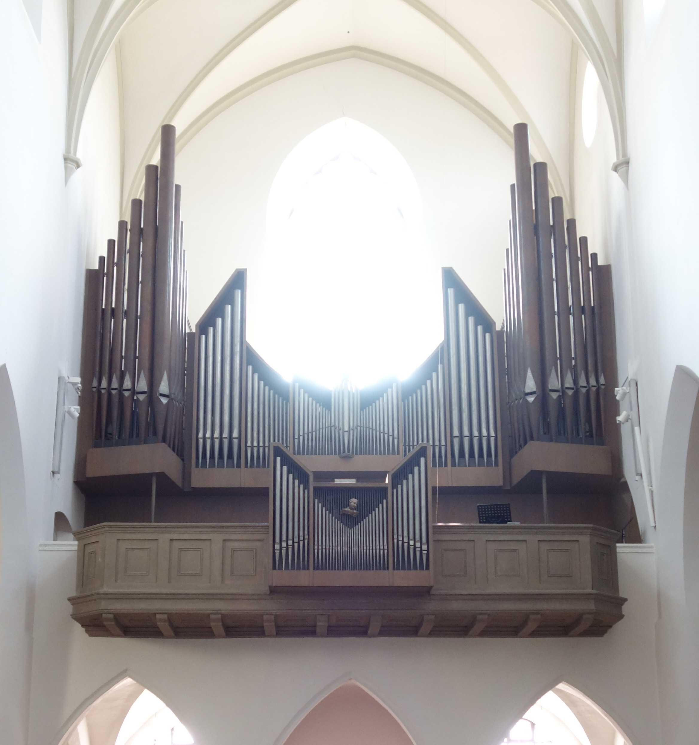 Orgel von St. Moritz in Ingolstadt (1964, Walcker, IV/51)